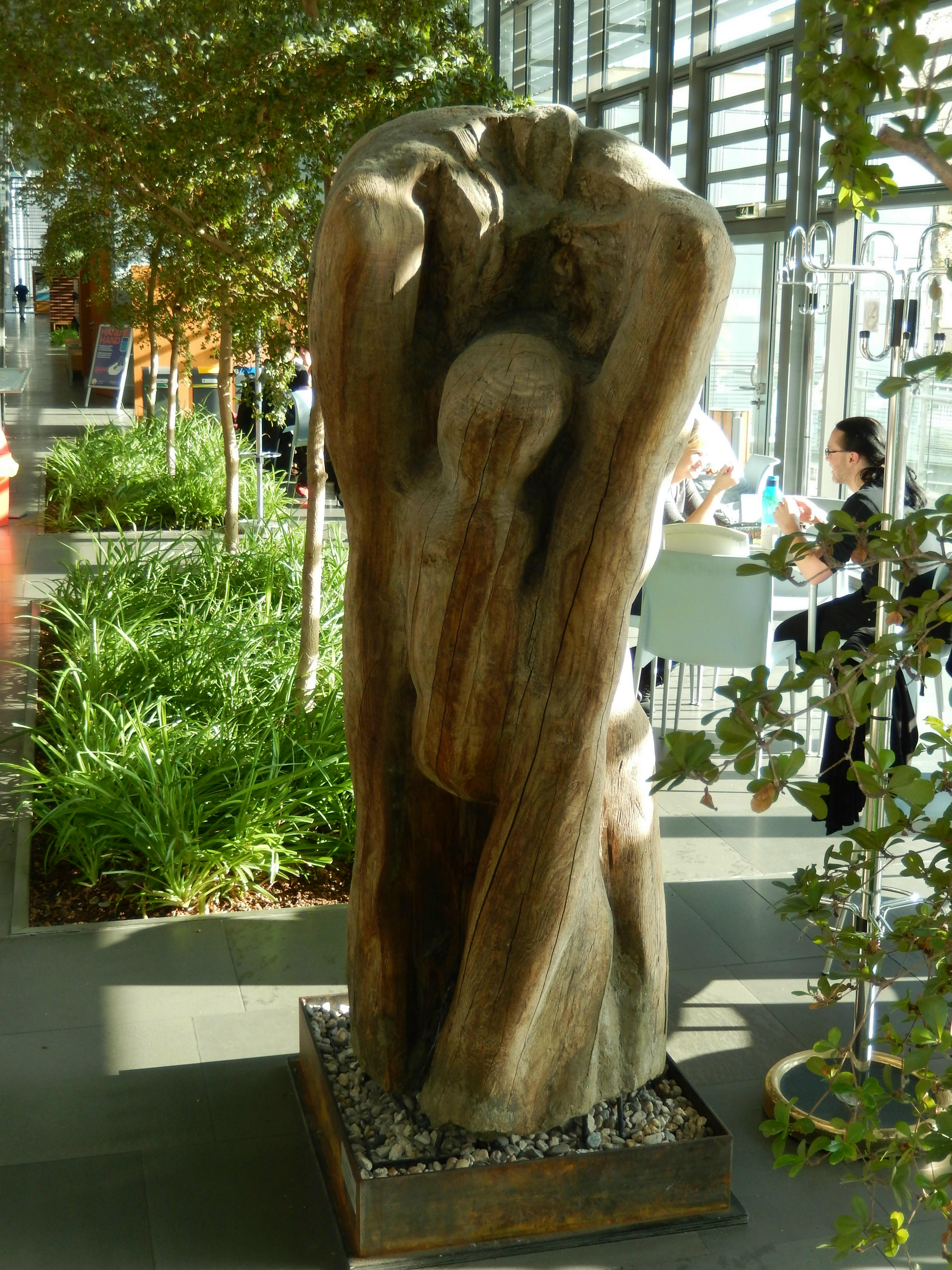 Dresden Univeritätsklinikum: Das Kind im Mann von Ulrich Eißner